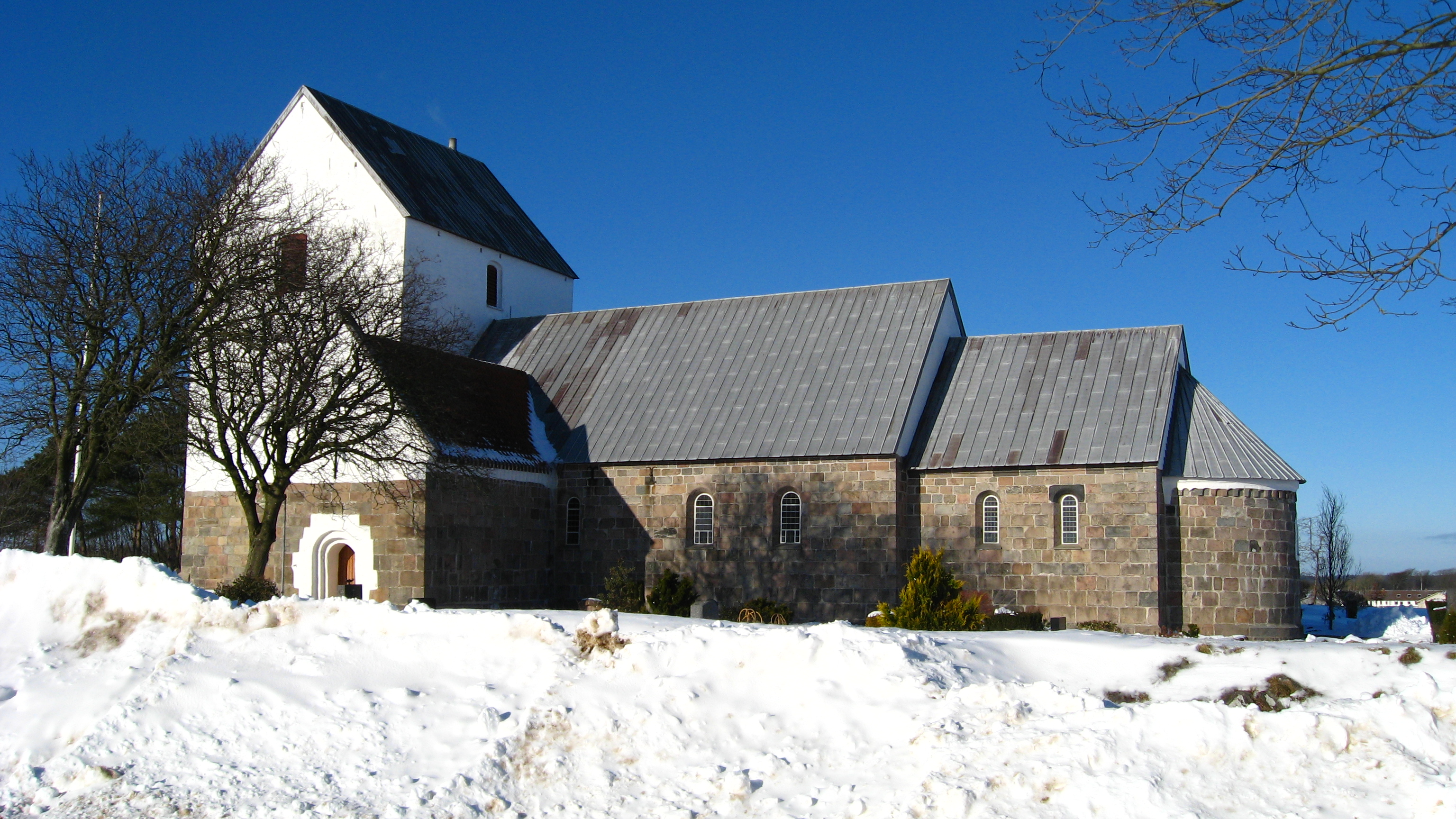 Ingstrup Kirke